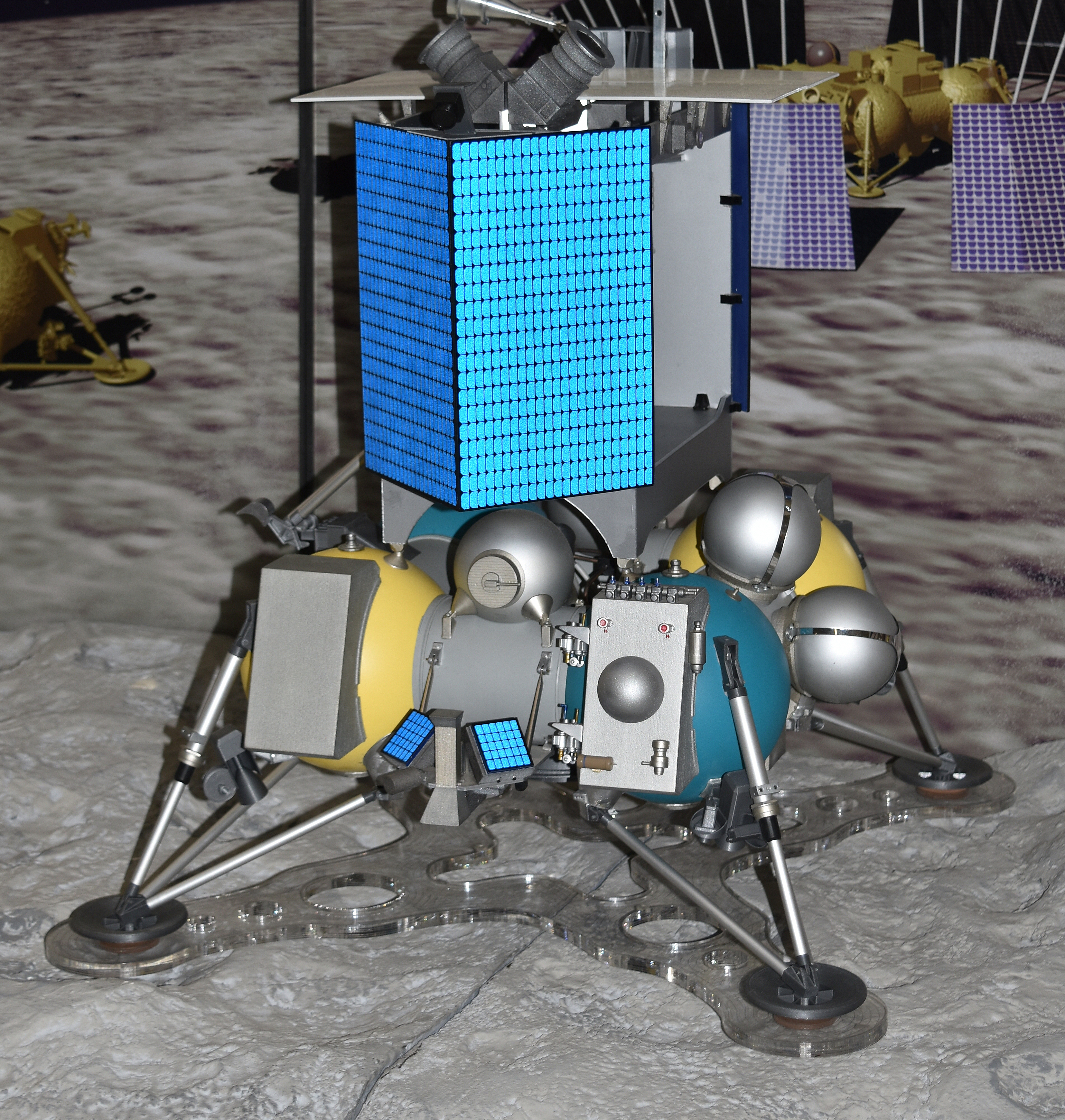 Atterrisseur lunaire russe Luna-Glob (Luna 25) Salon du Bourget 2015, Paris